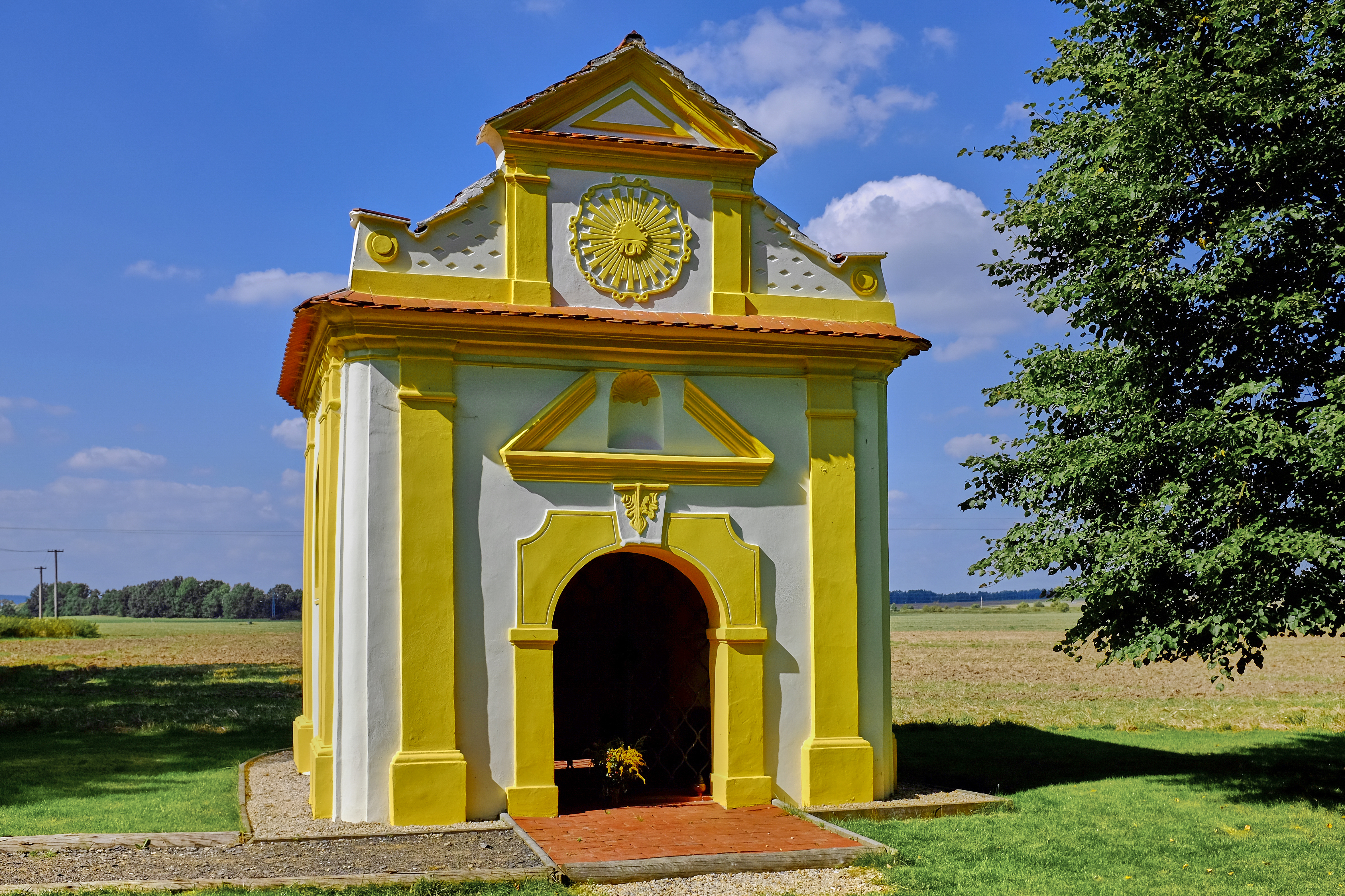 Kaple svaté Máří Magdaleny, st. 4, Vokov (Třebeň).